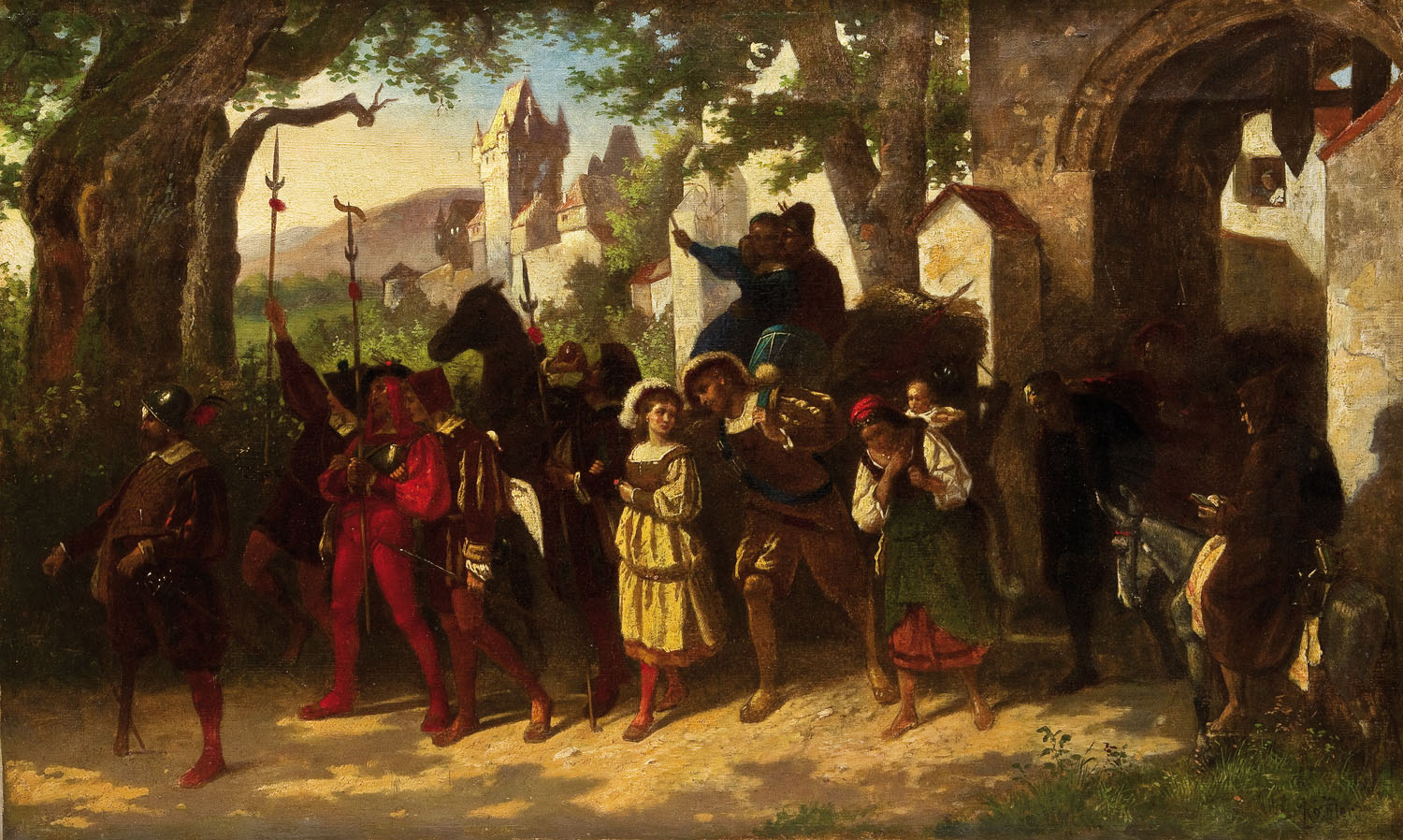 Vertreibung der Juden. Öl auf Leinwand. Unten rechts undeutlich signiert Rößler. 49,5 x 82 cm. Wohl Österreich, Mitte 19. Jh.